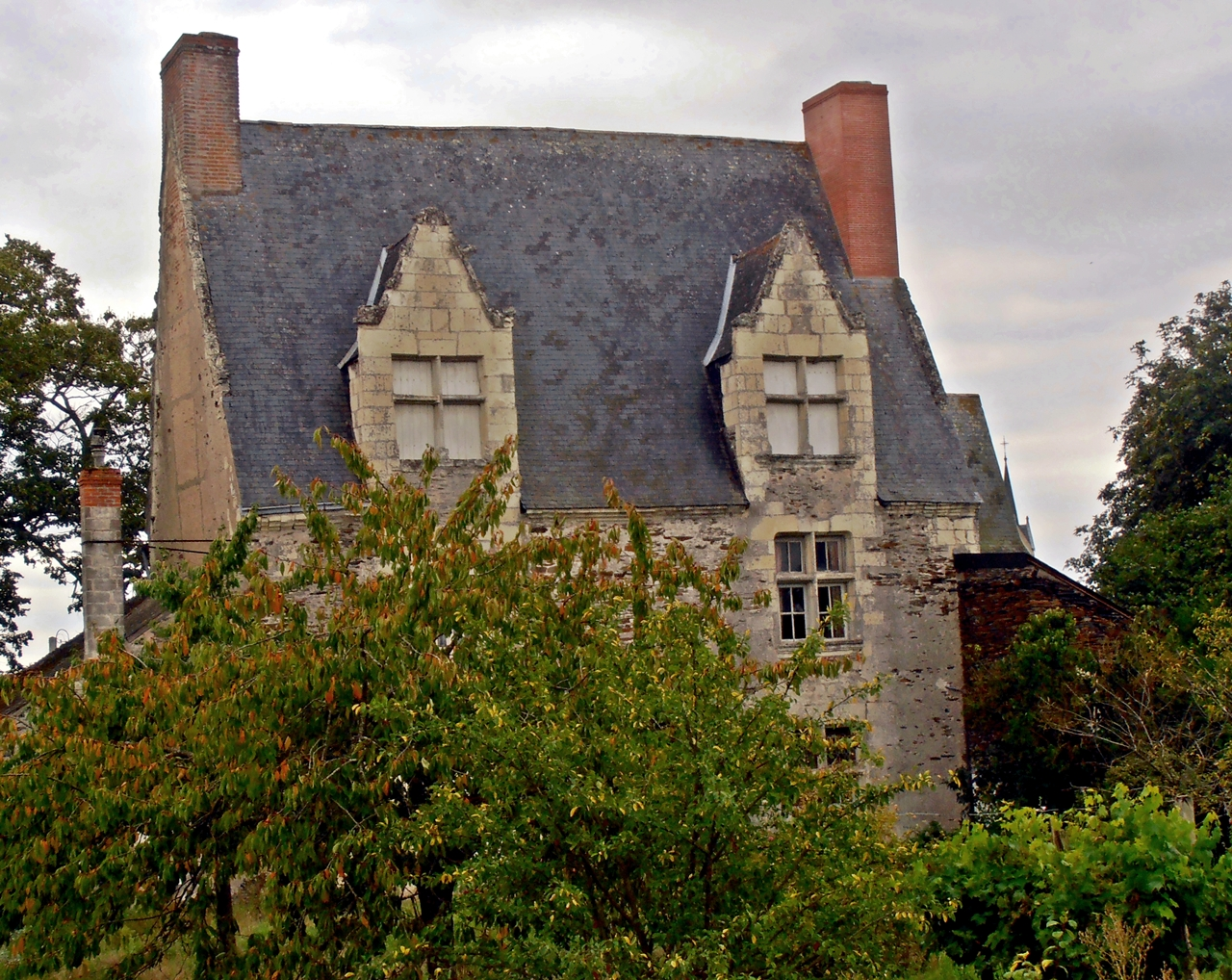 Logis de la Gachetière à Saint-Jean-des-Mauvrets (Maine-et-Loire, France).